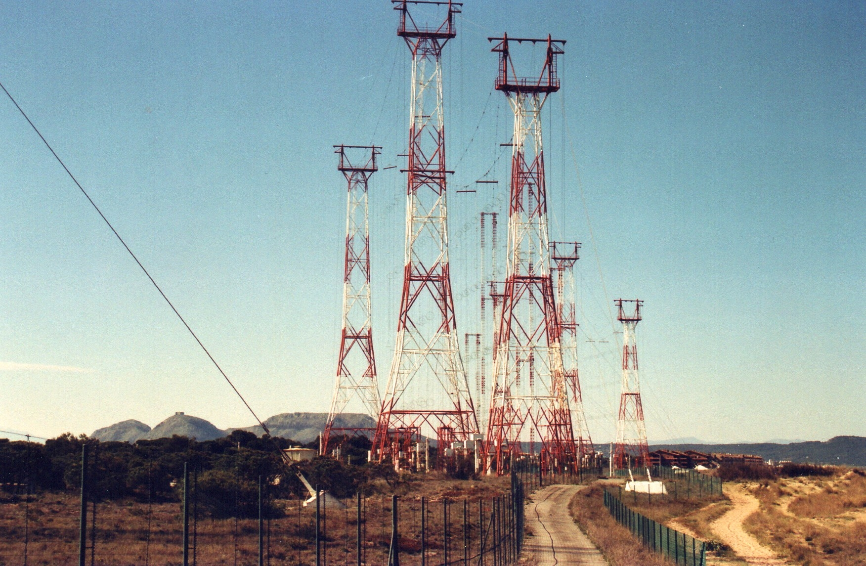 Antenas de las instalaciones de emisión de Radio Liberty en la playa de Pals (Gerona), año 2005.